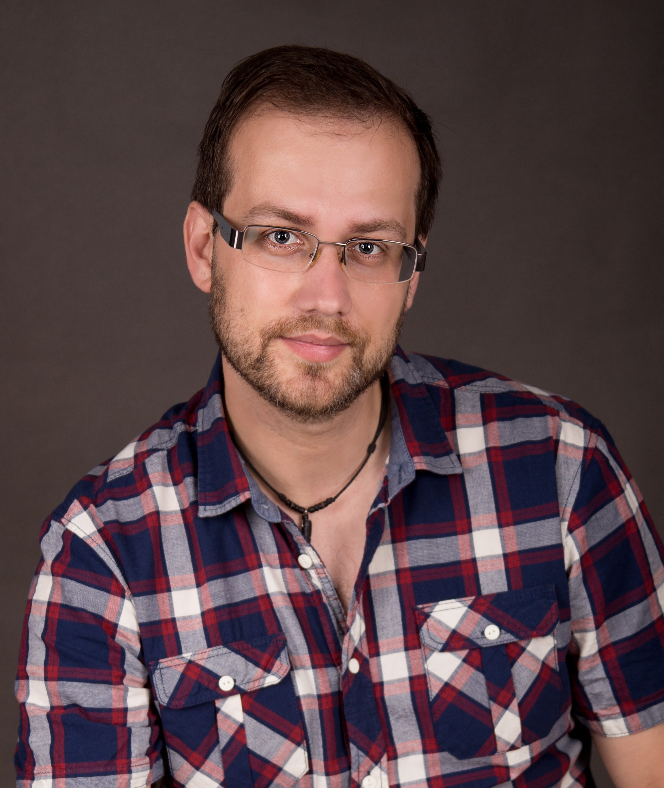 Miroslav Černý